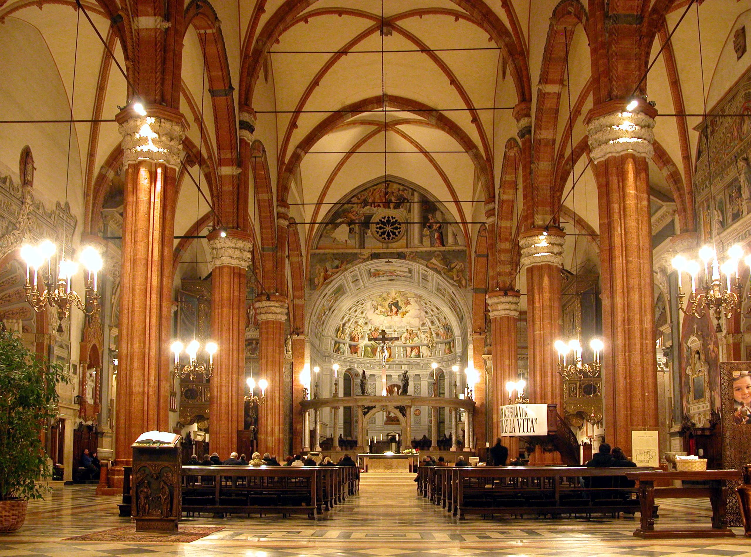 Cattedrale di Verona - navata centrale